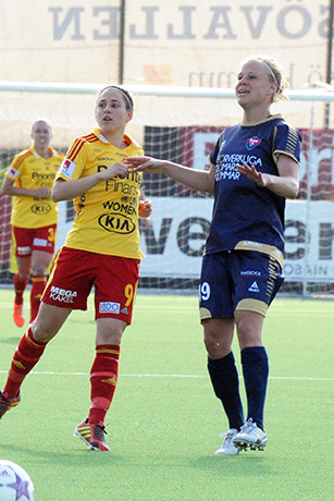 Verónica Boquete and Katrin Schmidt